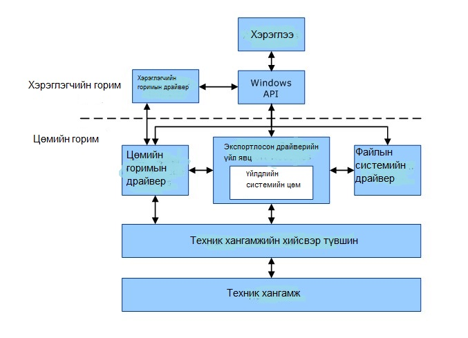 Монгол: Энэ диаграмм хэрэглэгчийн горим болон цөмийн горим бүрэлдэхүүн хэсгүүдийн хоорондын харилцаа холбоог харуулж байна.